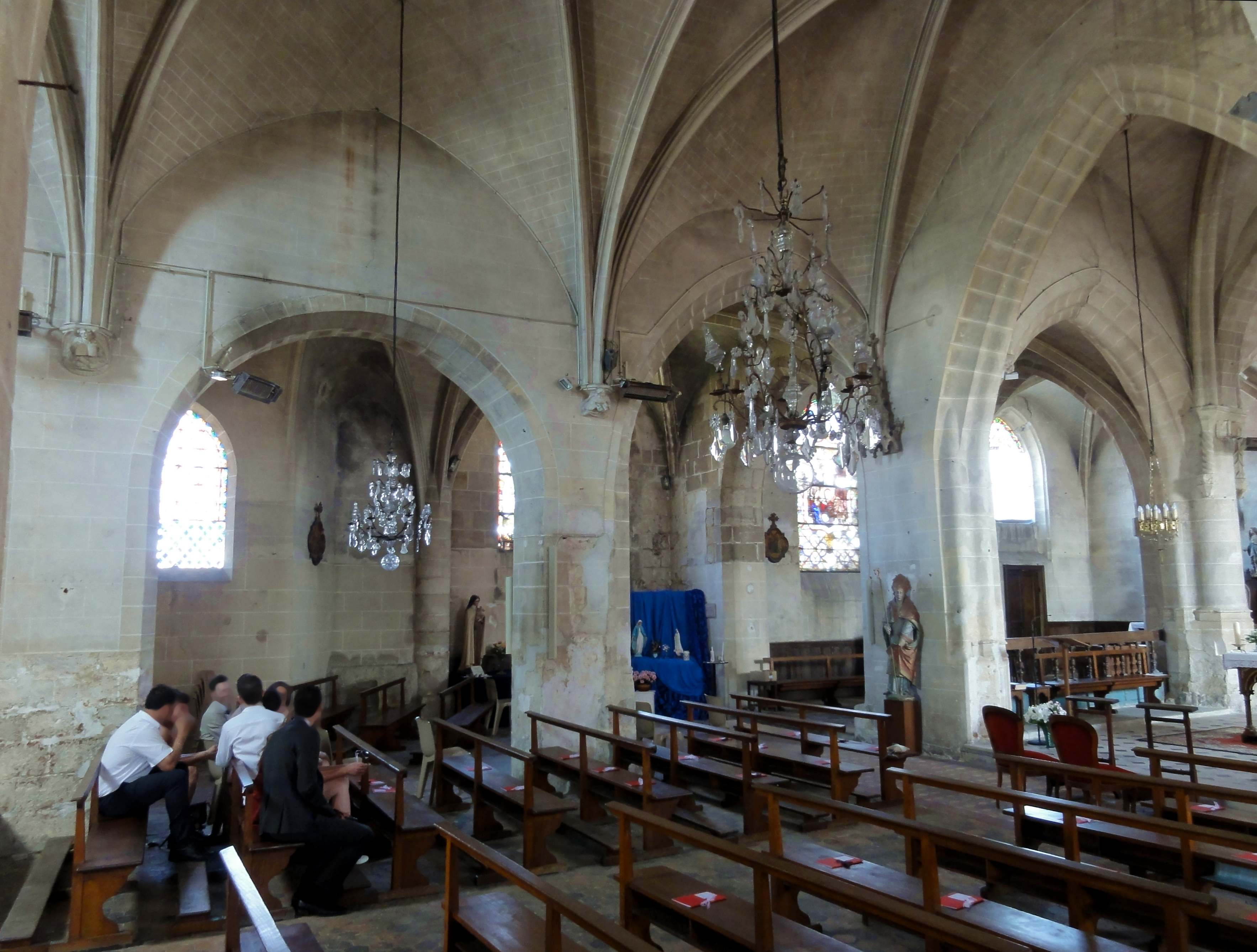 Intérieur de l'église (voir titre).